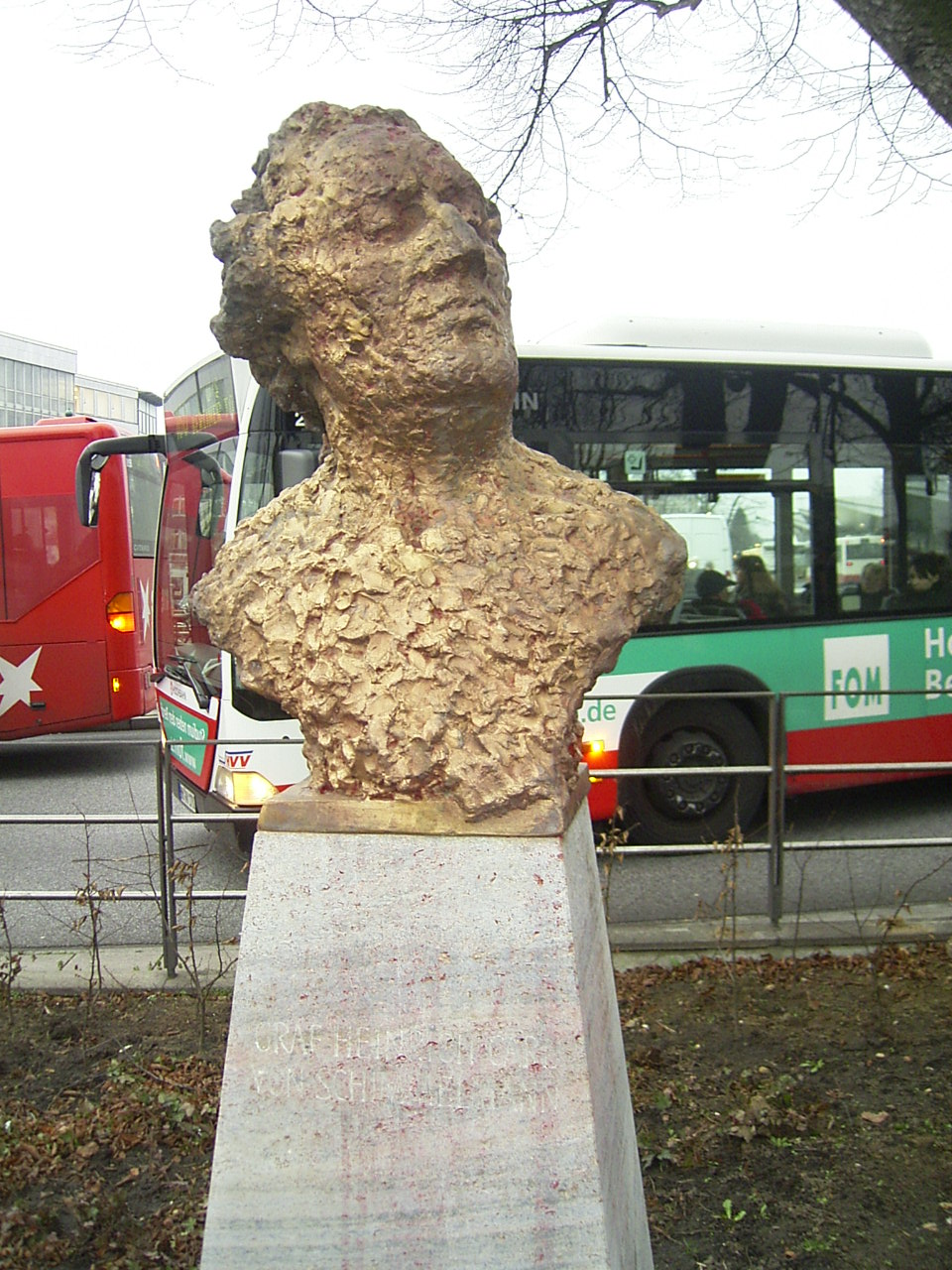 Büste Heinrich Carl Graf von Schimmelmanns am Wandsbeker Markt.